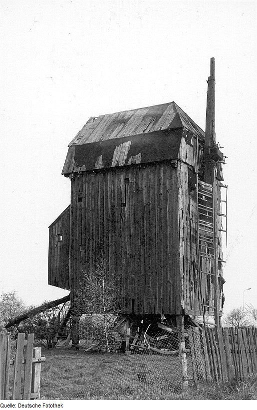 Original image description from the Deutsche Fotothek Jessen (Elster)-Seyda. Bockmühle